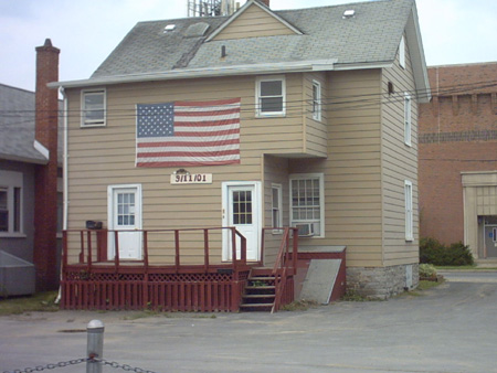 Plattsburgh, USA